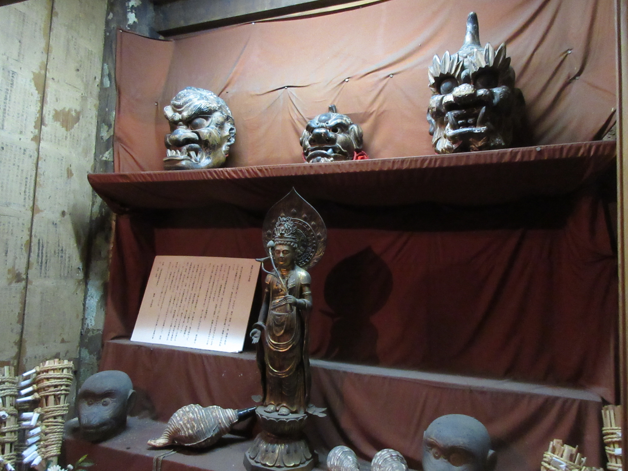 滝山寺鬼まつりで使用する祖父面、祖母面、孫面